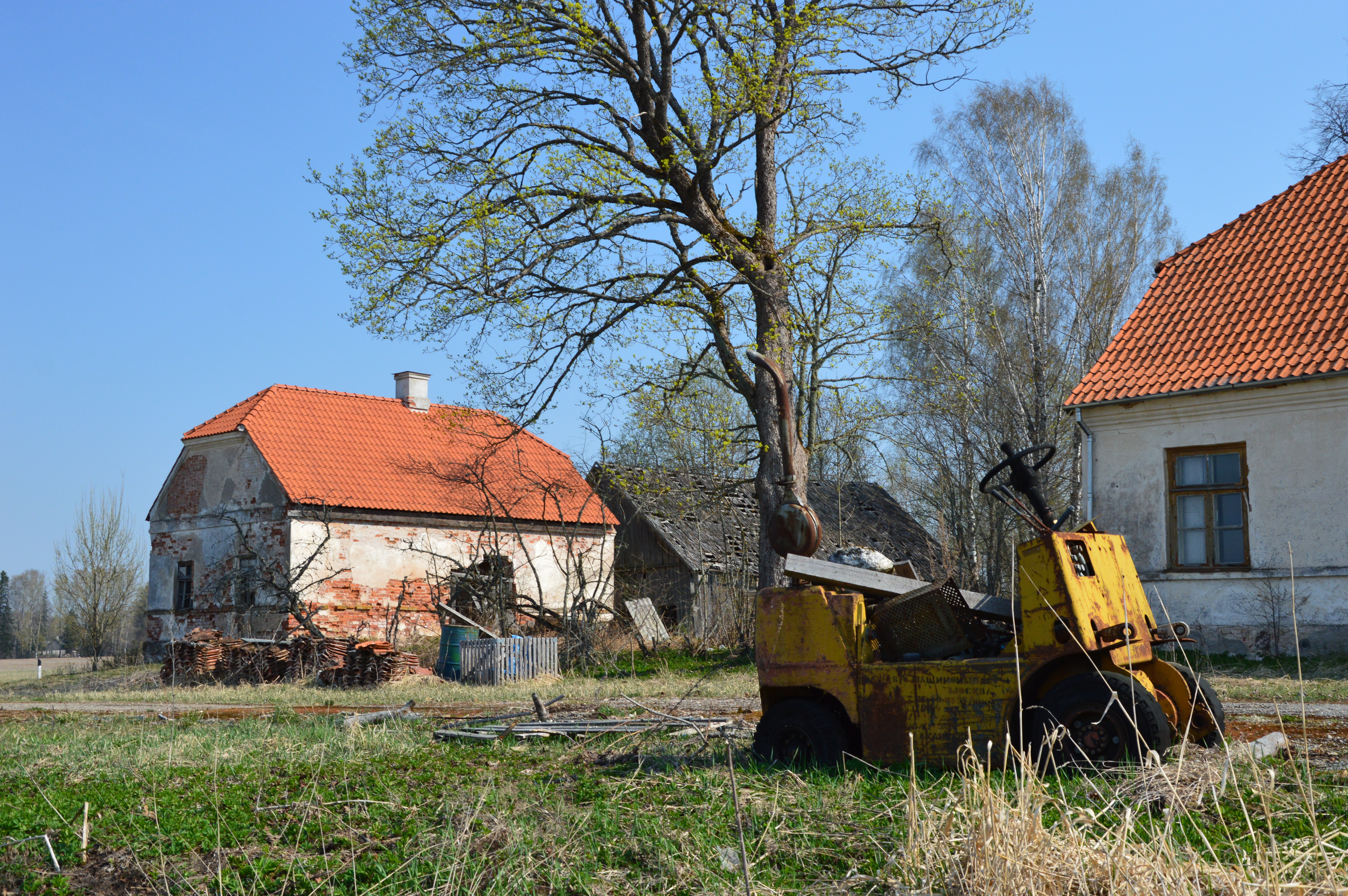 Sänna postijaam. Näha on nii Sänna postijaama hoone nurk kui ka postipoiste elamu.